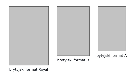 Formaty progresywne – przykłady (1)